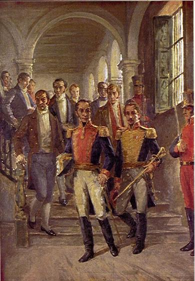 Simón Bolivar, Francisco de Paula Santander y otros proceres de la independencia saliendo del Congreso de Cúcuta (imagen)